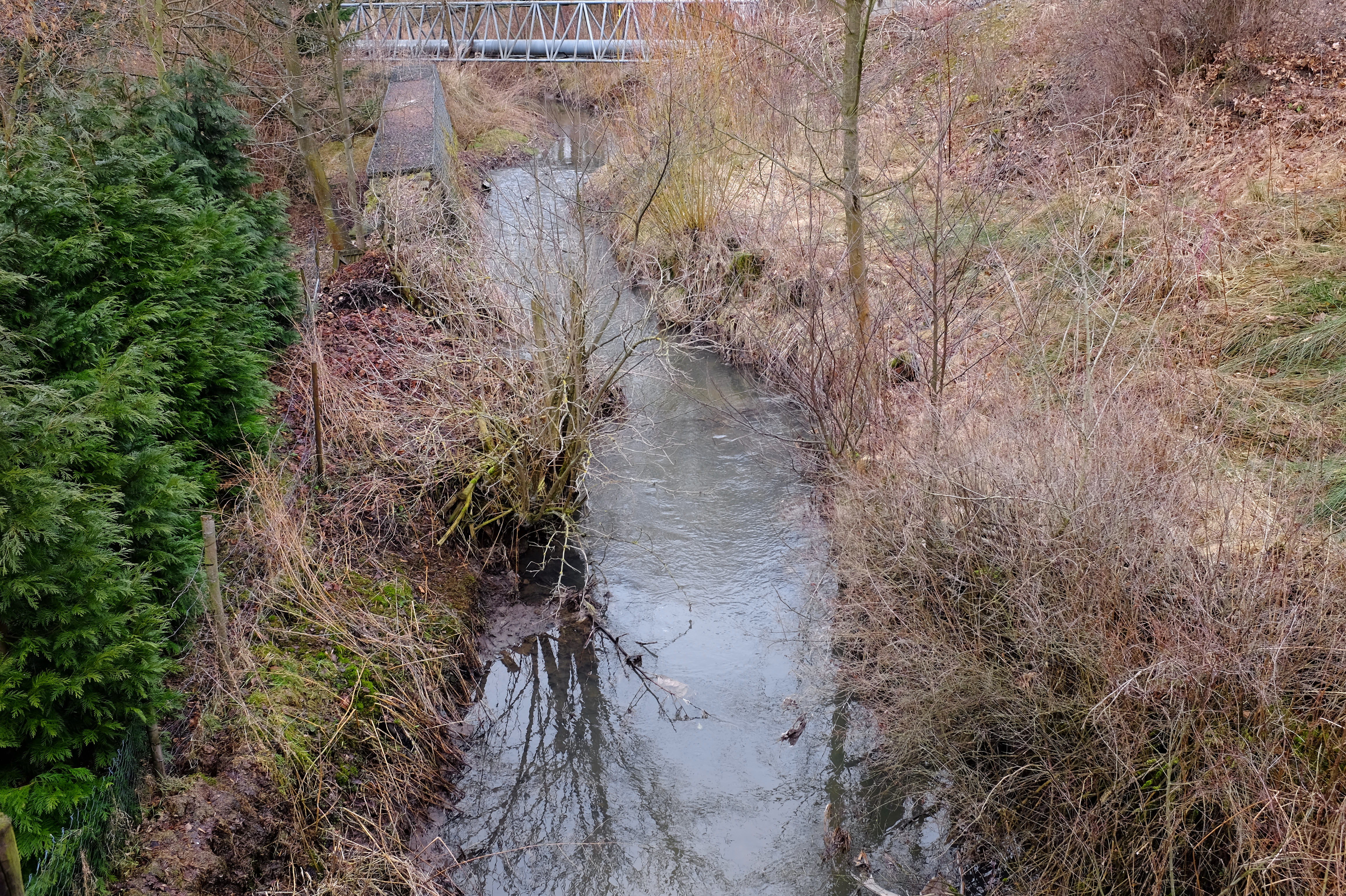 Habartovský potok u obce Bukovany, okres Sokolov